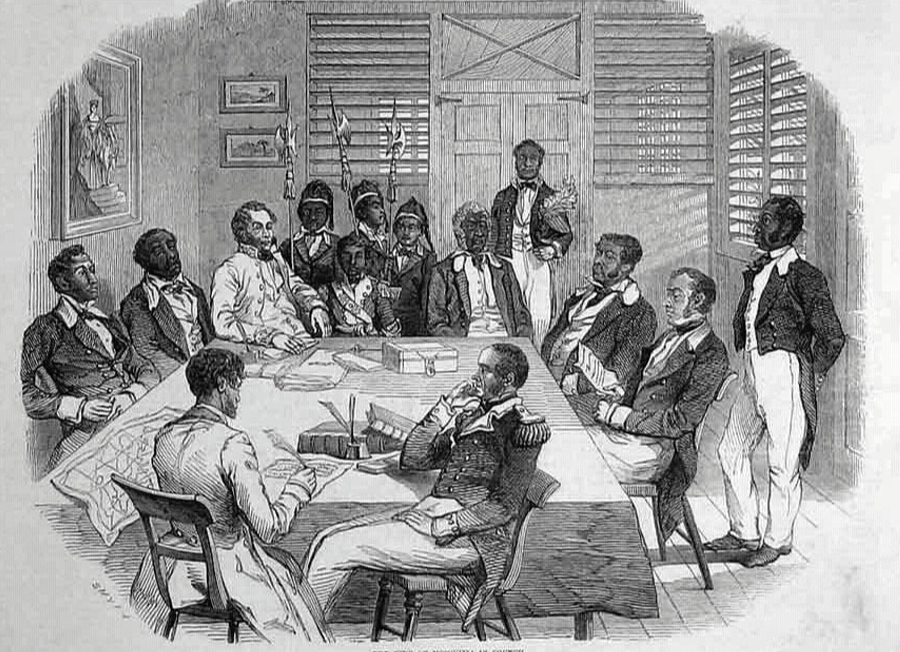 Coast of mosquitos independance